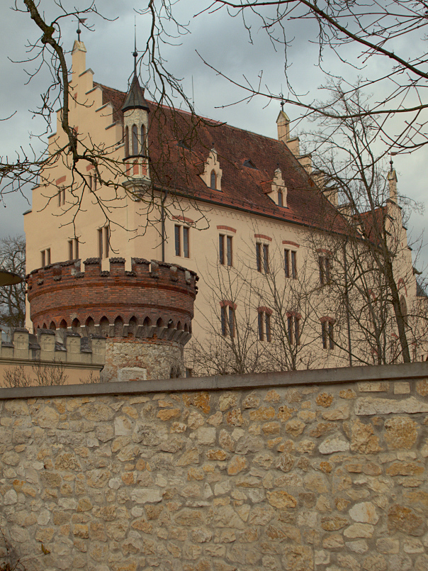 Schlosseinfahrt